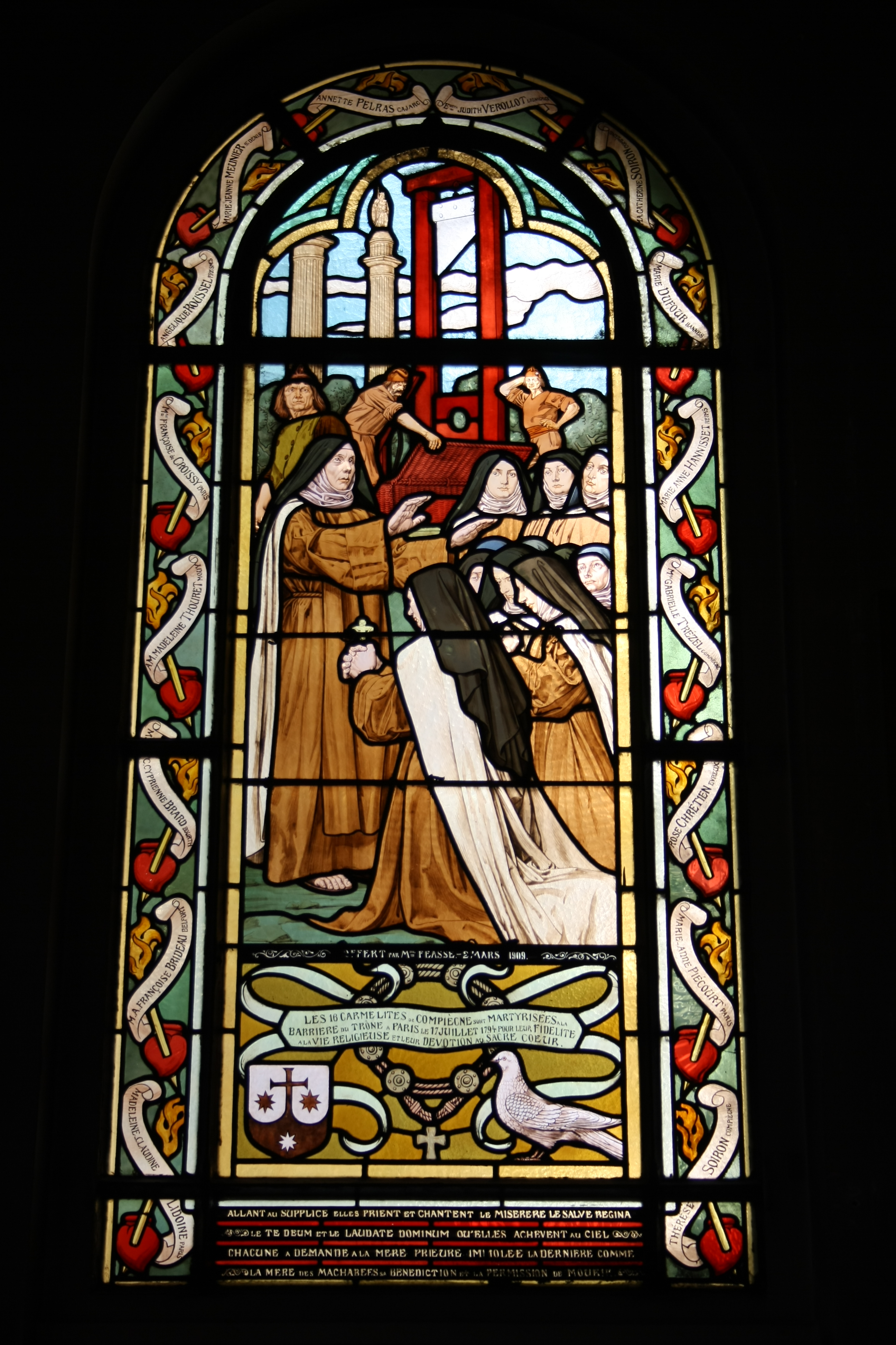 Bleiglasfenster in der Kirche Saint-Honoré d'Eylau (Avenue Raymond-Poincaré im 16. Arrondissement von Paris), Darstellung: 14 Karmelitinnen von Compiègne, die 1794 während der Französischen Revolution ermordet wurden. Hersteller des Fensters: Félix Gaudin nach einem Karton von Raphaël Freida.